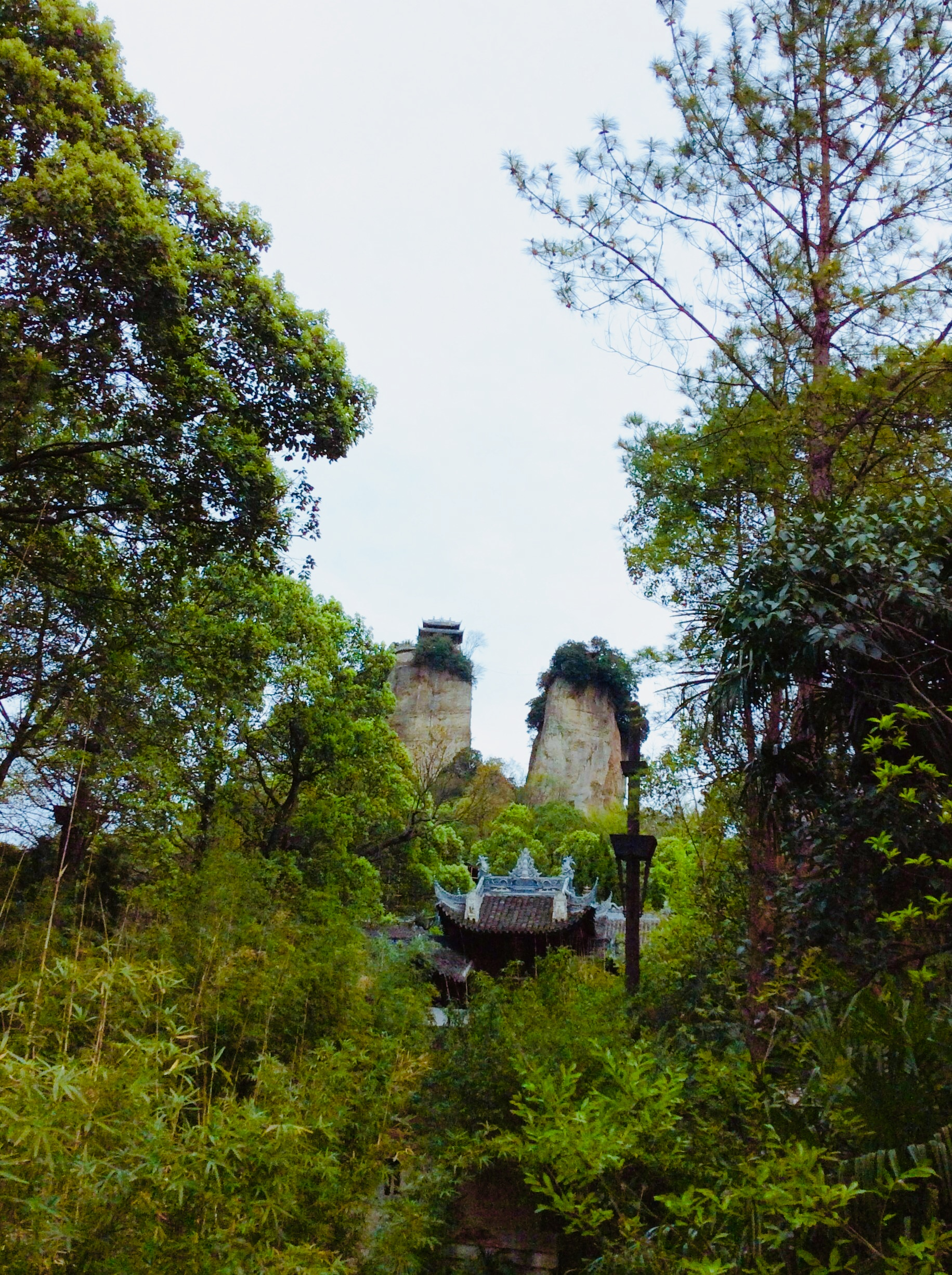 运用ipad mini 2在日间拍摄，使用了ios自带照片app修整。